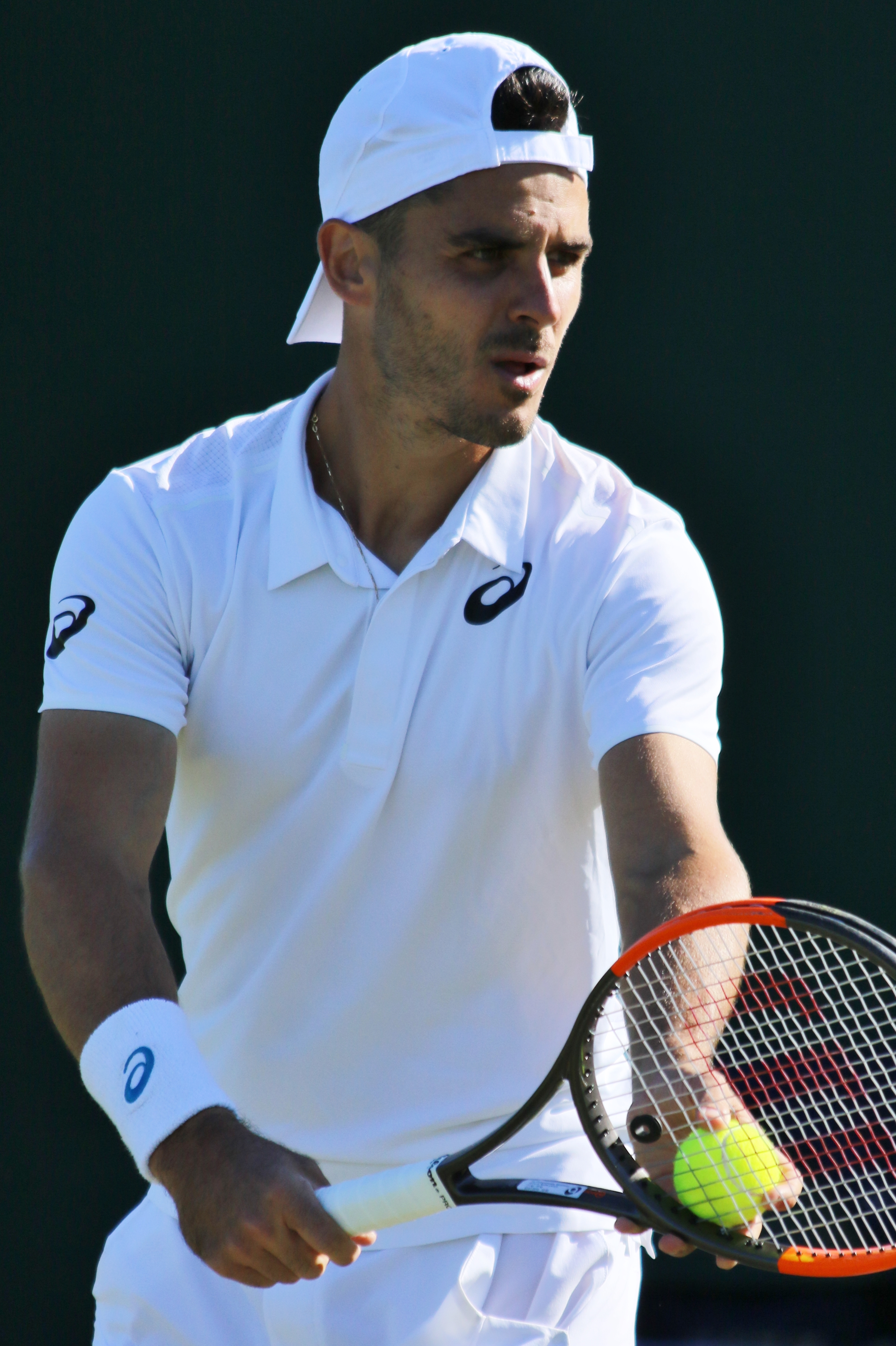 Fabbiano WM18 (15)